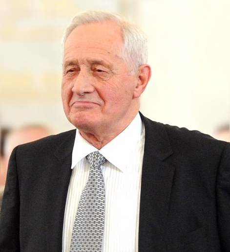 Вручение Государственных премий Российской Федерации за 2015 год. Лауреат Государственной премии в области науки и технологий Эрик Галимов.